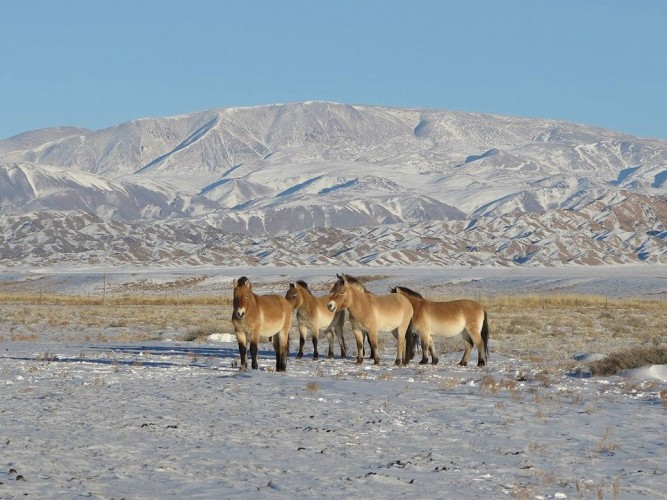 Монгол: Gobi-Altai aimag, Bugat sum, takhiin tal